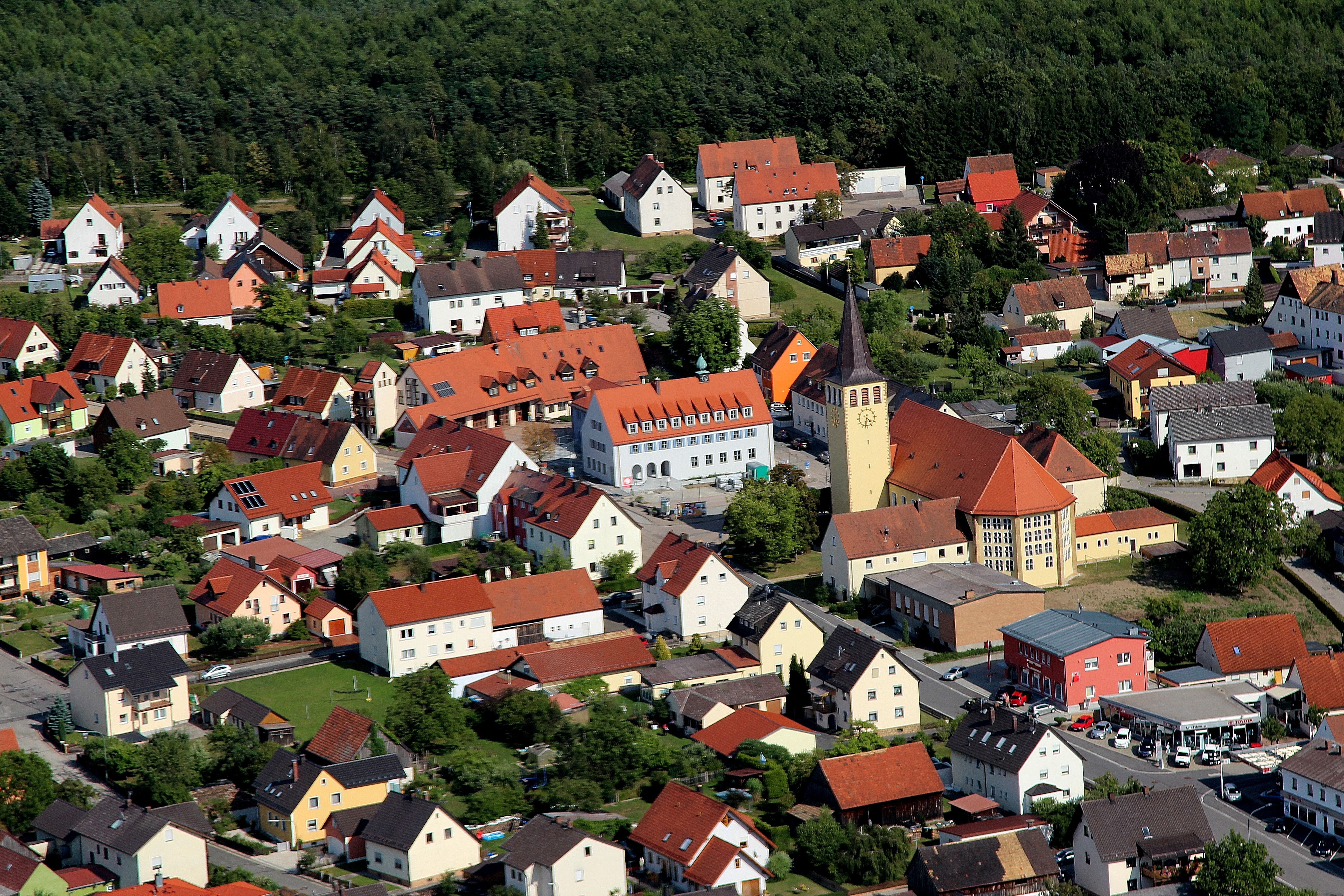 Wackersdorf, Pfarrkirche St. Stephanus; Landkreis Schwandorf, Oberpfalz, Bayern